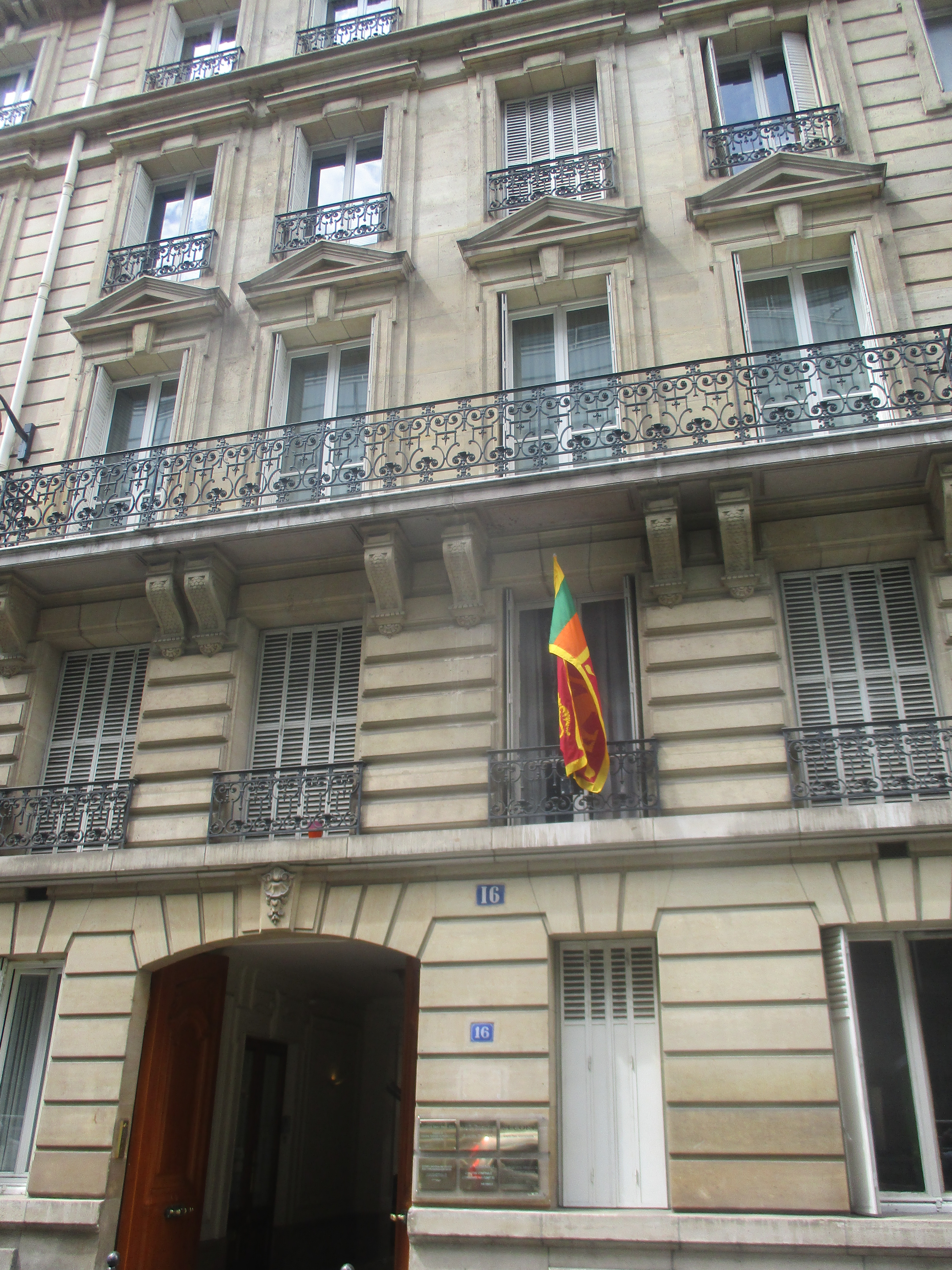 16 rue Spontini, Paris XVIe. Ambassade du Sri Lanka au premier étage.